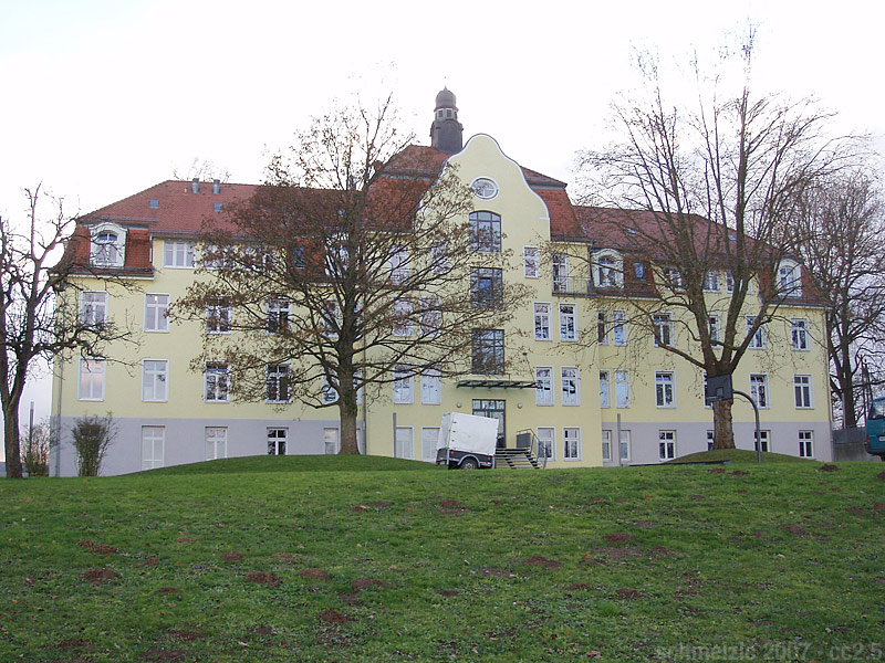 Haus Wilhelmsruhe in Heilbronn-Sontheim